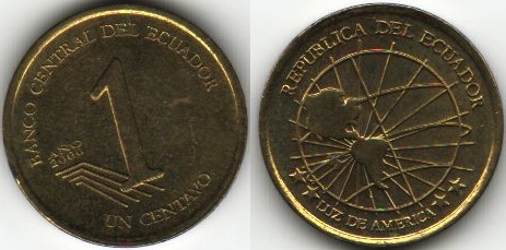 Ecuadorian 1 Centavo coin